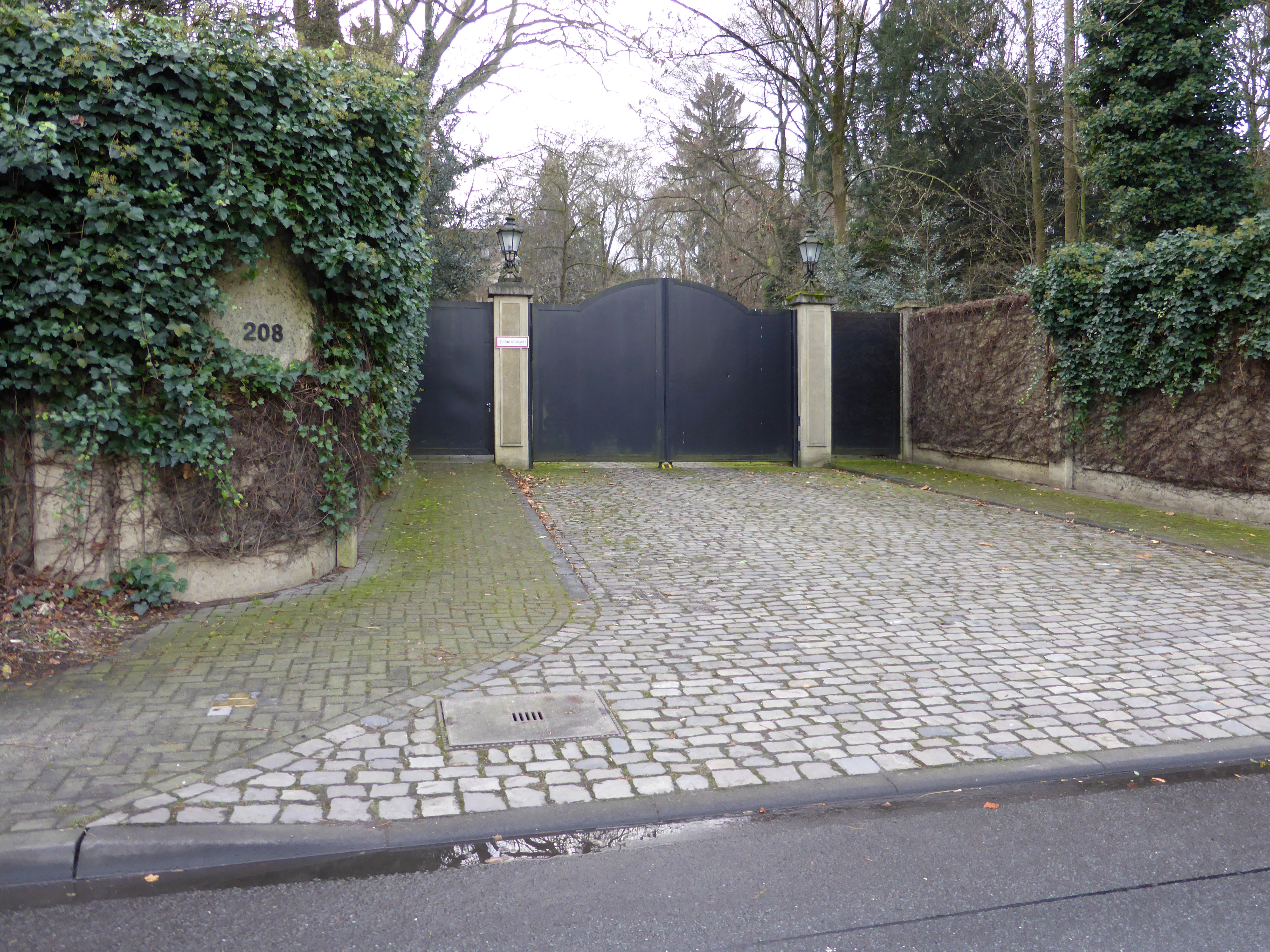 Stolperstein: Verlegestelle Oberländer Ufer 208, Köln.